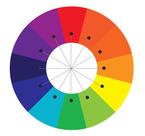 Complementary Color